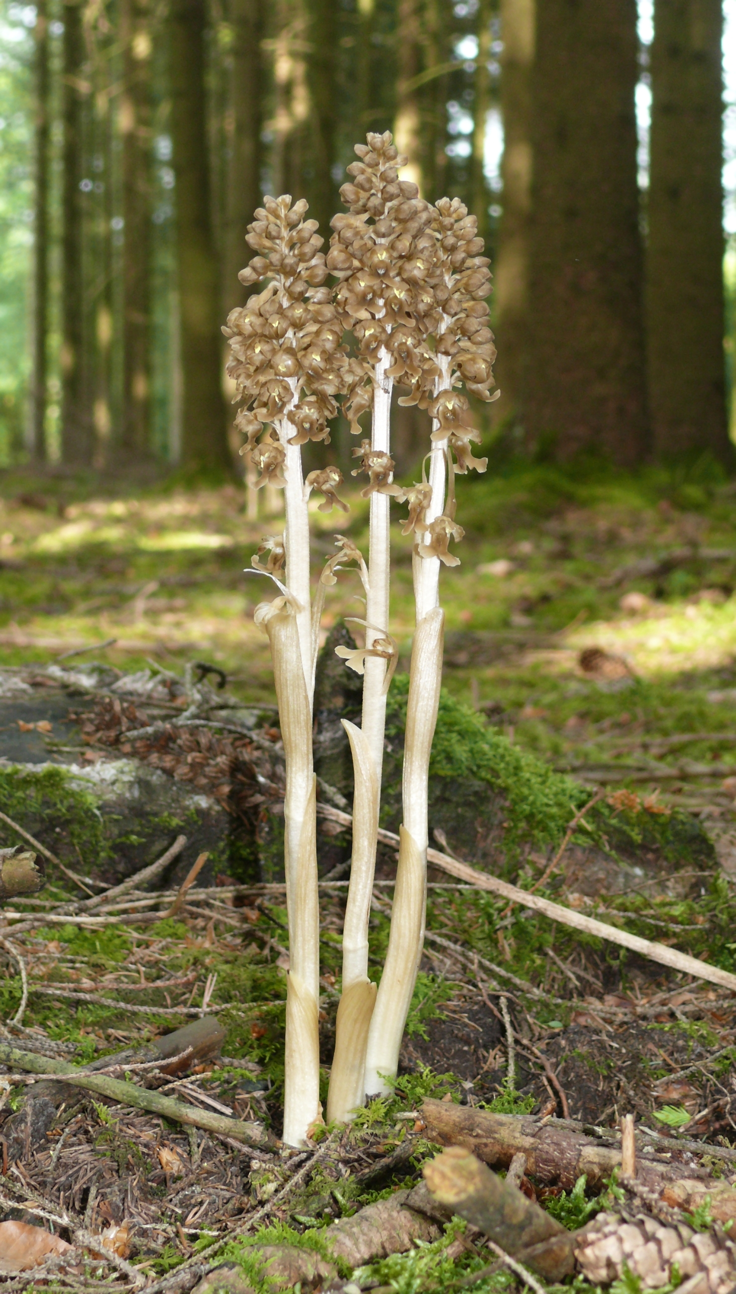 Neottiua nidus-avis, Alb-Wutach, Deutschland